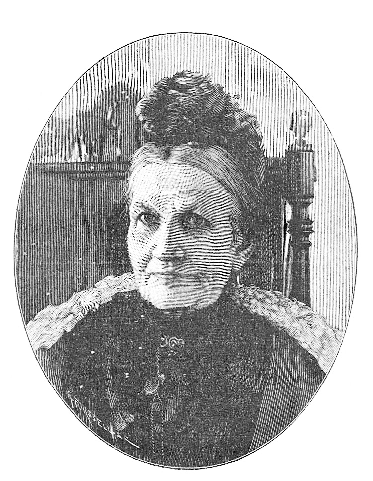 Carolina Lindström (1812-1892)